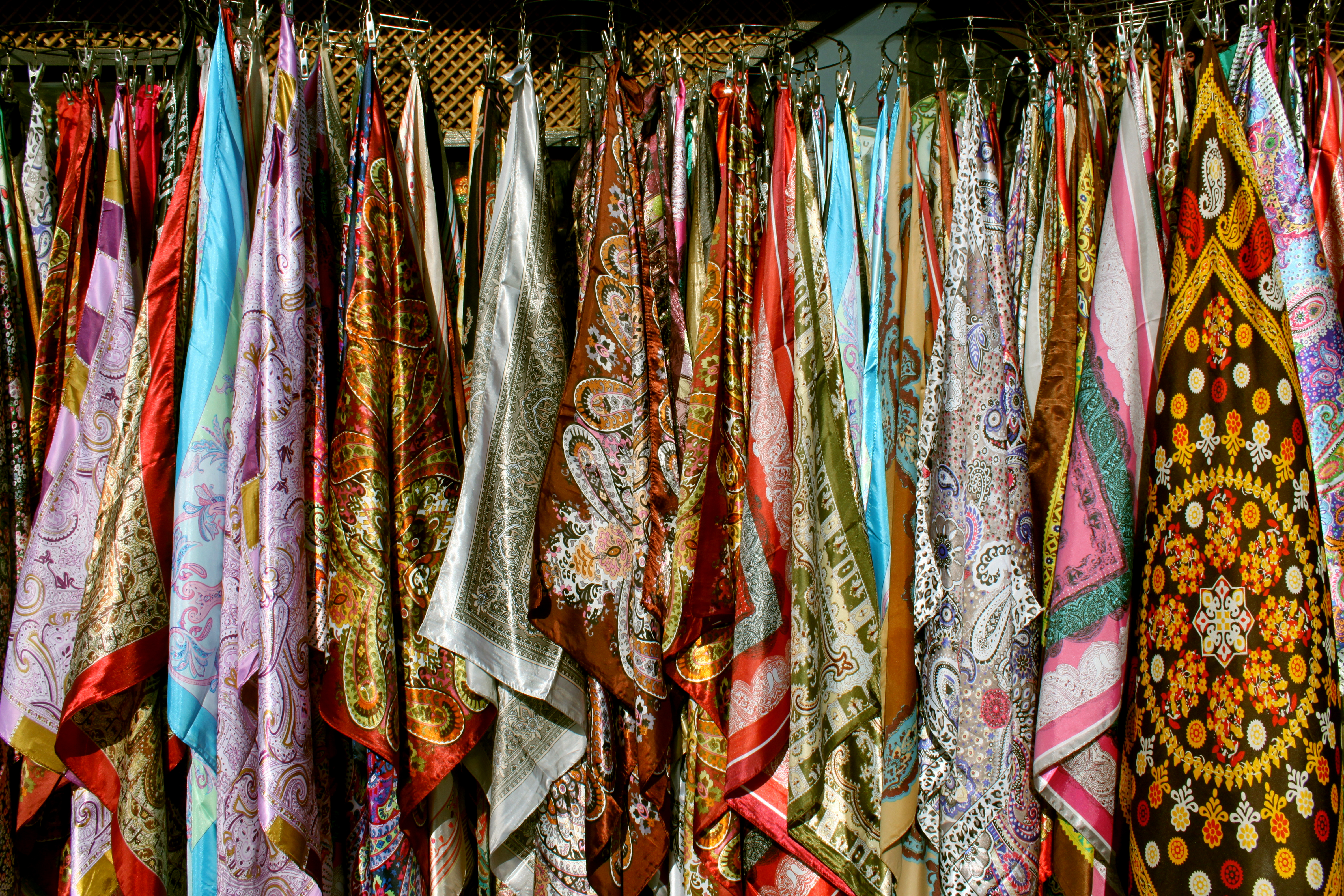 Azərbaycan ipəyindən kəlağayılar